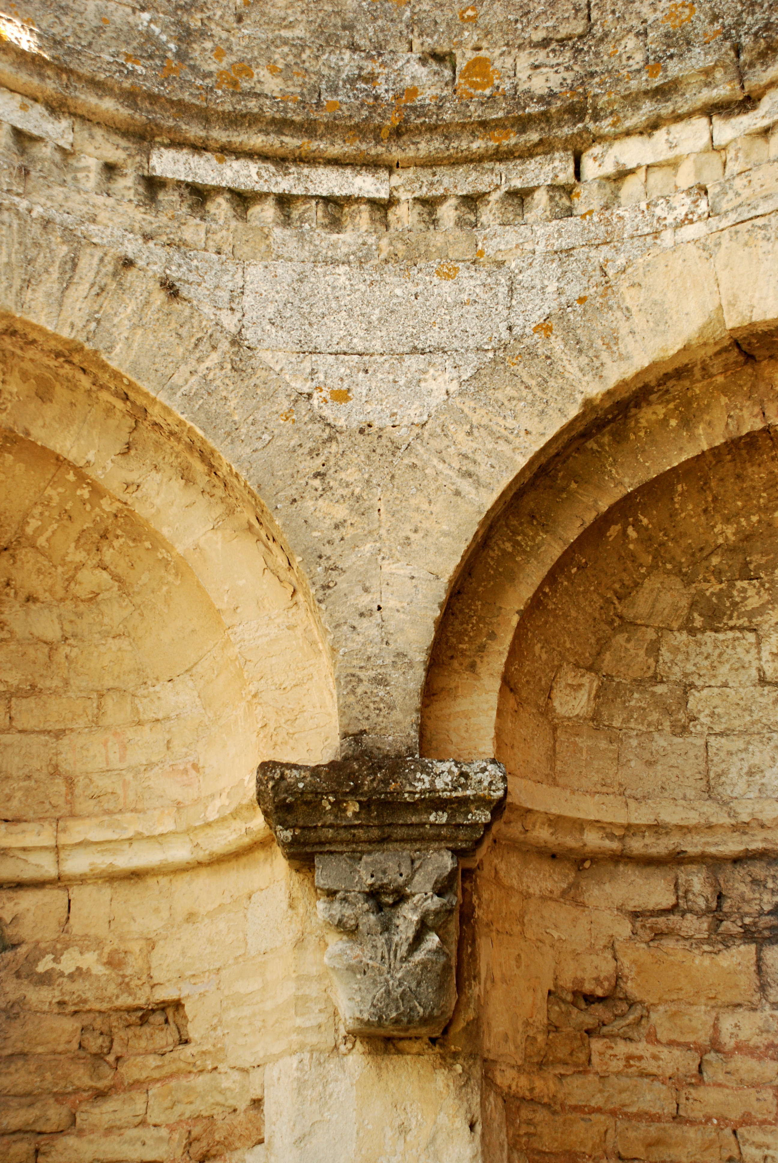 France - Gard - Chapelle Saint-Martin de Saint-Victor-la-Coste